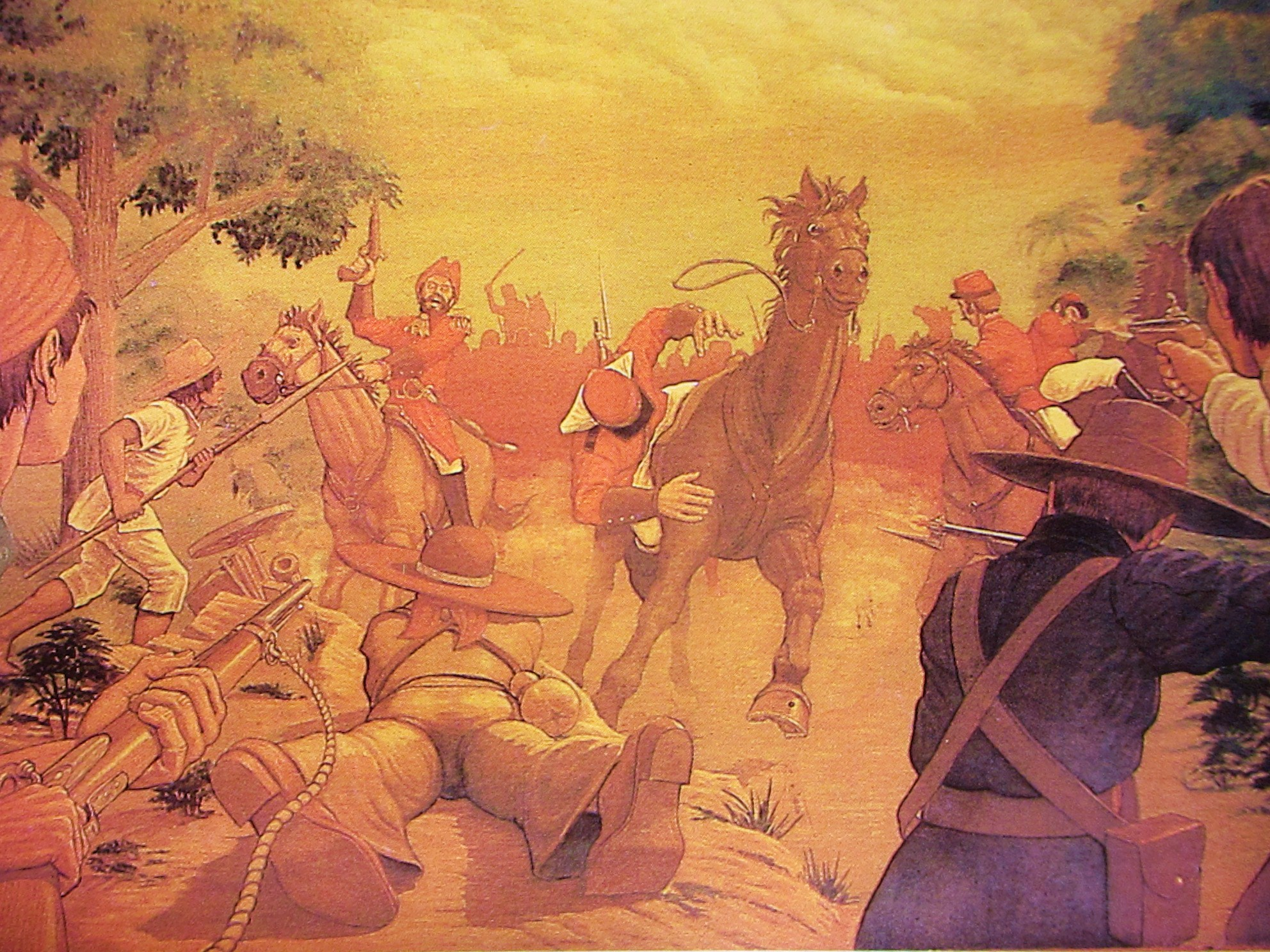 La Batalla del Jahuactal se realizó el 1 de noviembre de 1863 en el municipio de Cunduacán, Tabasco, México, y formó parte de la intervención francesa en Tabasco. El resultado fue una victoria del Ejército liberal tabasqueño comandado por el Gral. Gregorio Méndez Magaña.